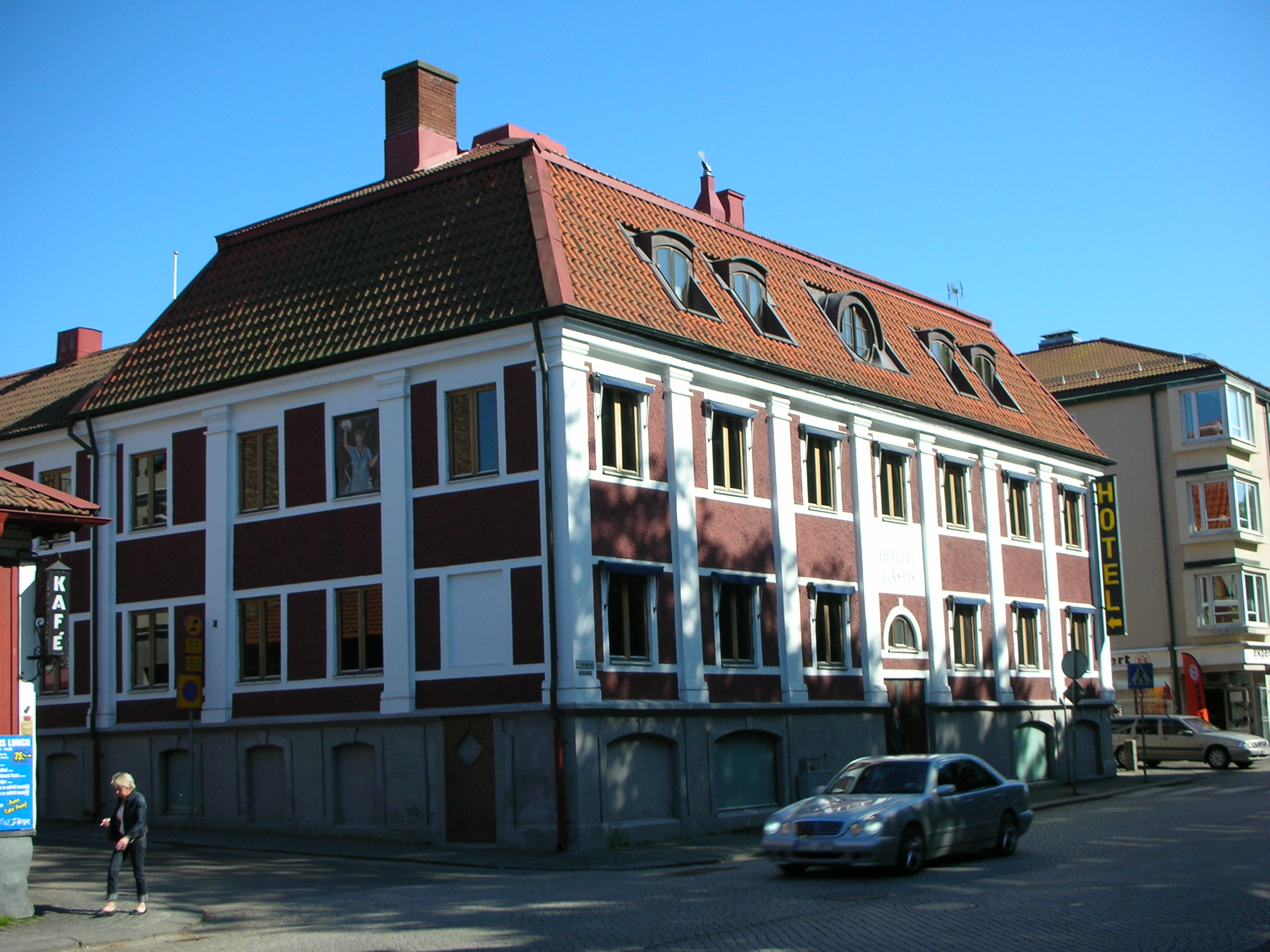 Hotell Gästis, Varberg.